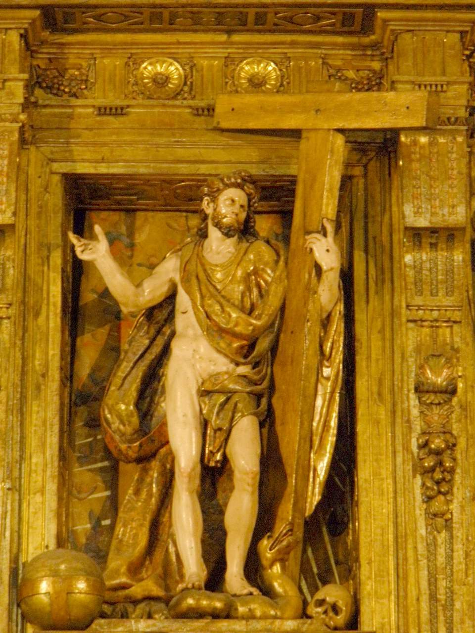 Retablo mayor de la Iglesia de Santa María de Tafalla (Navarra). Obra cumbre del escultor José de Ancheta, en estilo manierista romanista, de finales del S-XVI